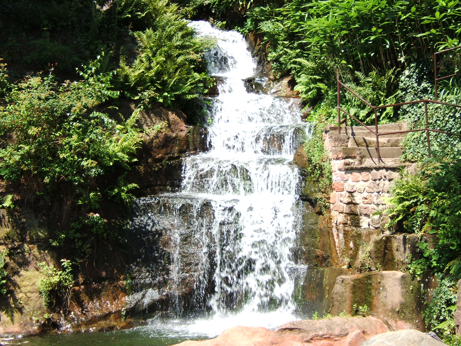 Wasserfall im Japanischen Garten Kaiserslautern